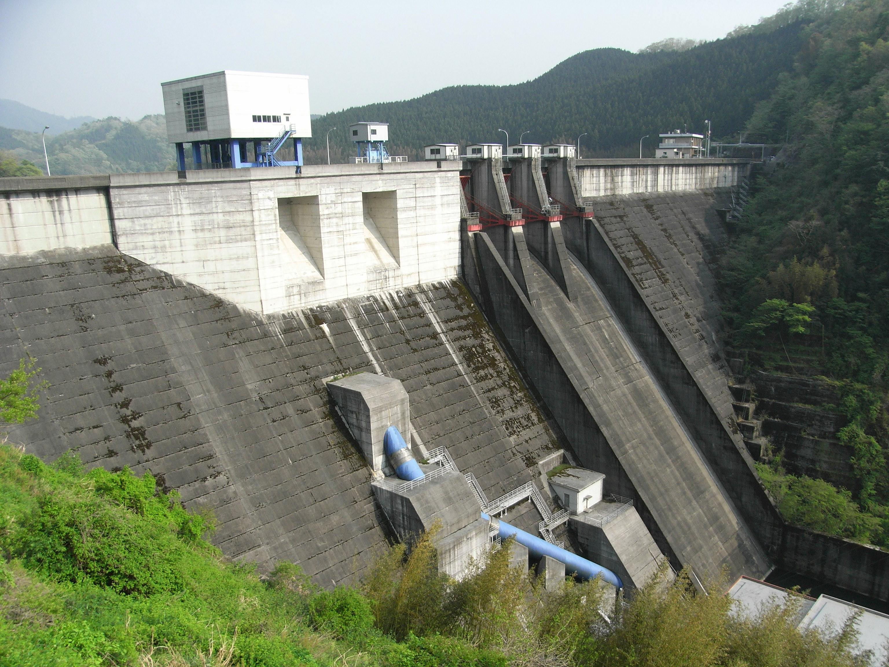 Dam